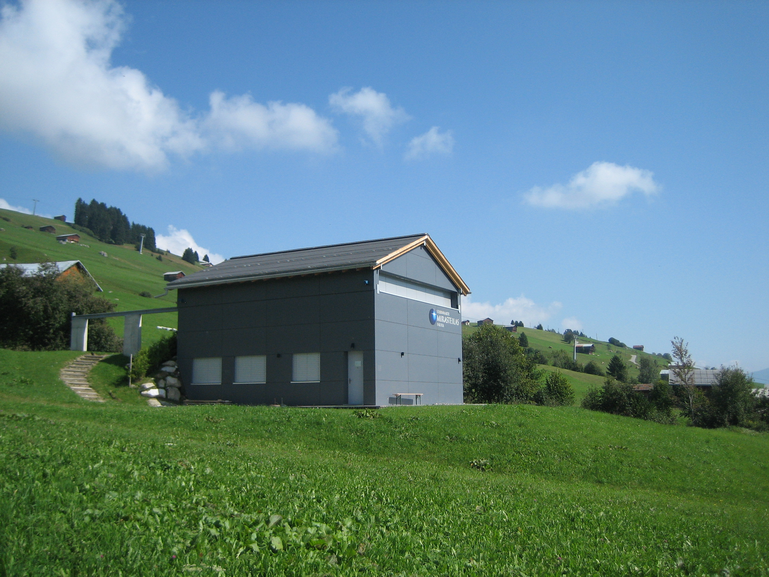 Sternwarte Mirasteilas im Sommer 2009